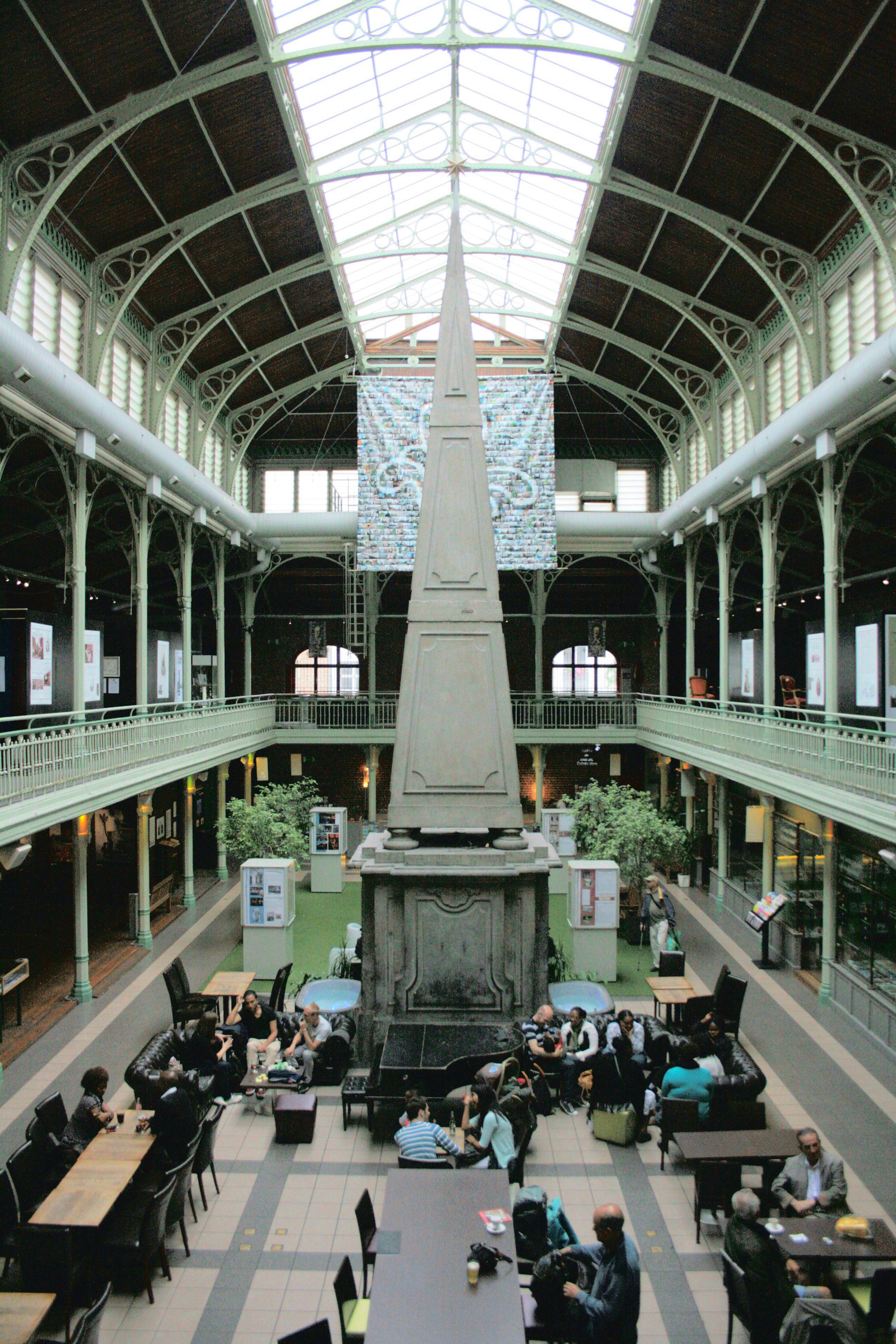 Halles Saint-Géry (1881), place Saint-Géry, Bruxelles (Belgique). Café Bar des Halles Saint-Géry